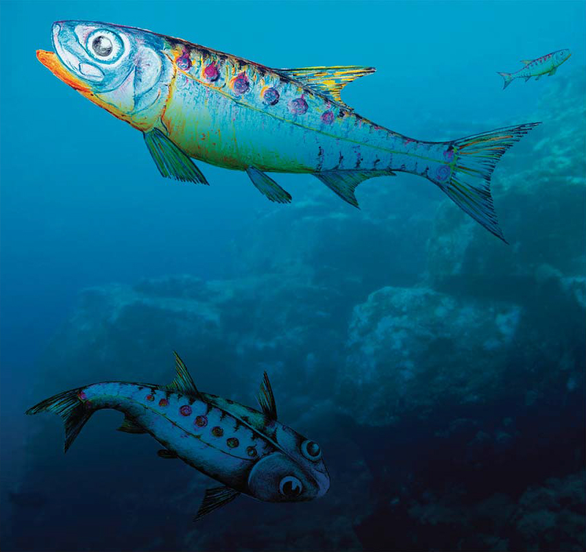 Reconstitución en vivo de †Varasichthys ariasi.